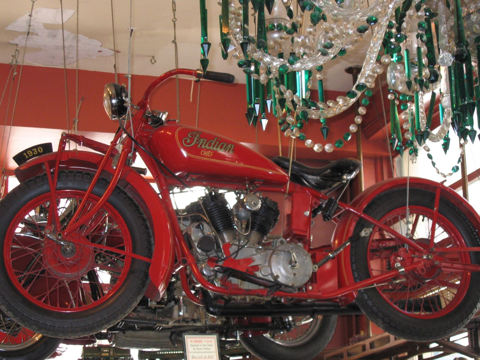 Antique cycle hanging on display in a restaurant